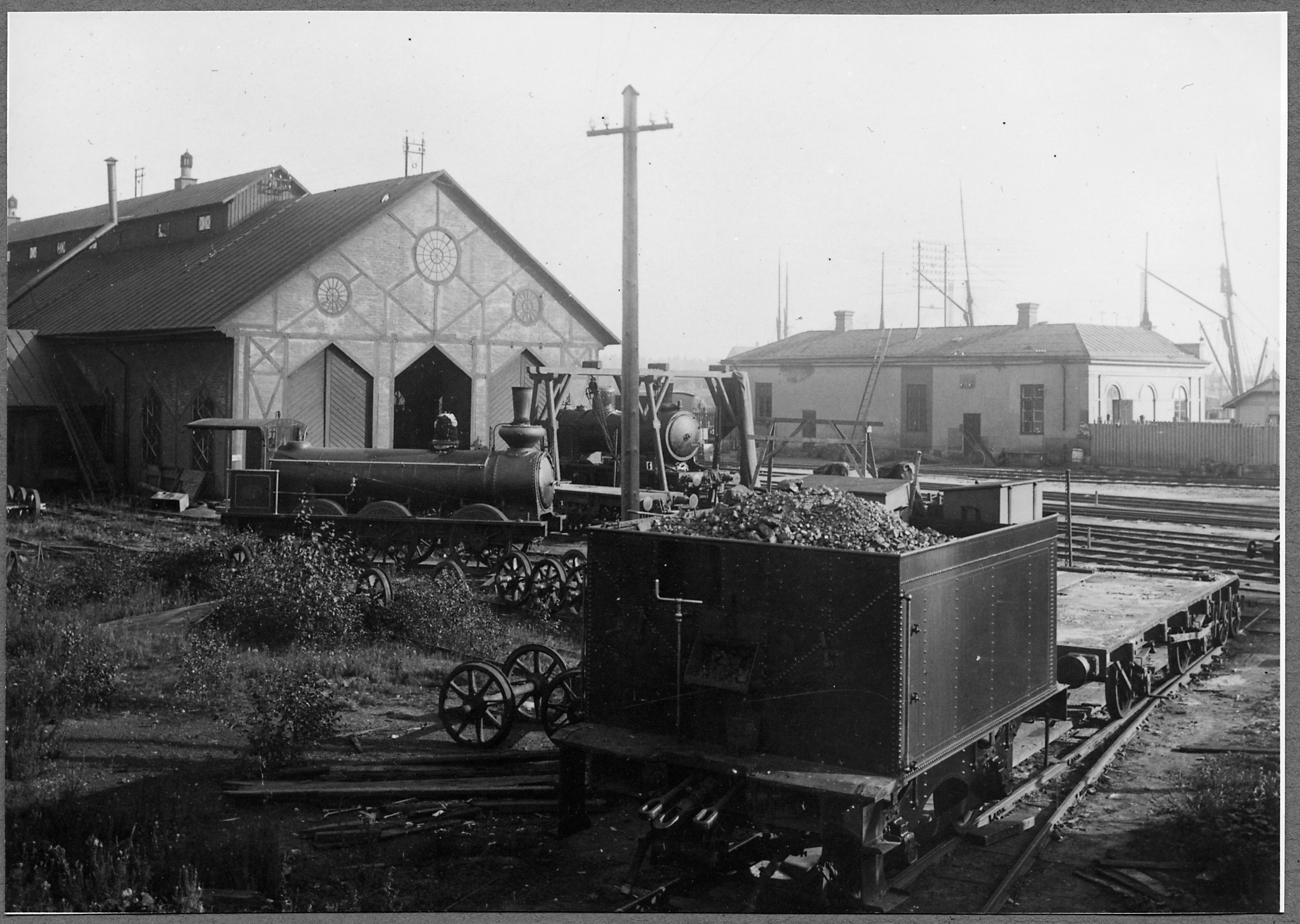 Text på baksida: "GDJ repverkstad vid Gävle N. ca 1900 lok 32". Text på omslag: "Gävle - Dala Järnväg", "G.D.J. Lok Litt: K. N:r 32 "Gustav Wasa". SJ. Litt: KA9. N:r 1859. Tillverkare: Nohab år 1893. Tillverknings - r 365. Axelanordning: C. Foto från G.D.J. verkstad i Gävle N. år 1900. Loket skrotat i Vislanda år 1955.". Historik: Blev 1948 Statens Järnvägar SJ KA9 1859, sedan 1949 Mackmyra 1 och slopat 1955.